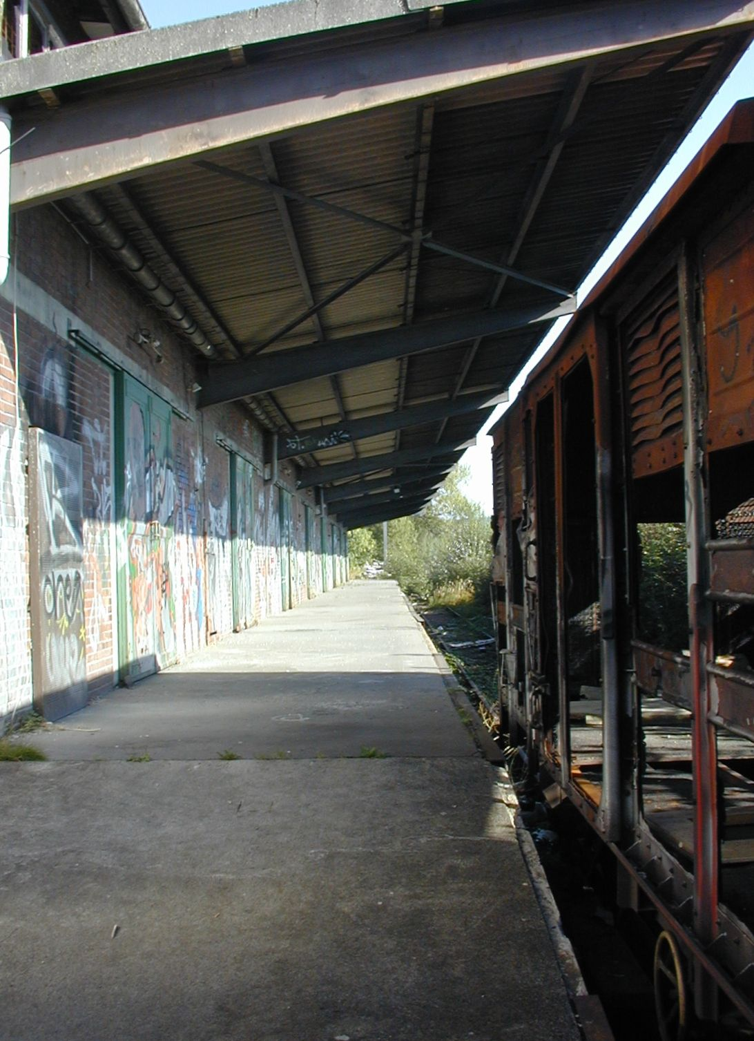 Stückguthalle des ehemaligen Bahnhofs Witten Ost